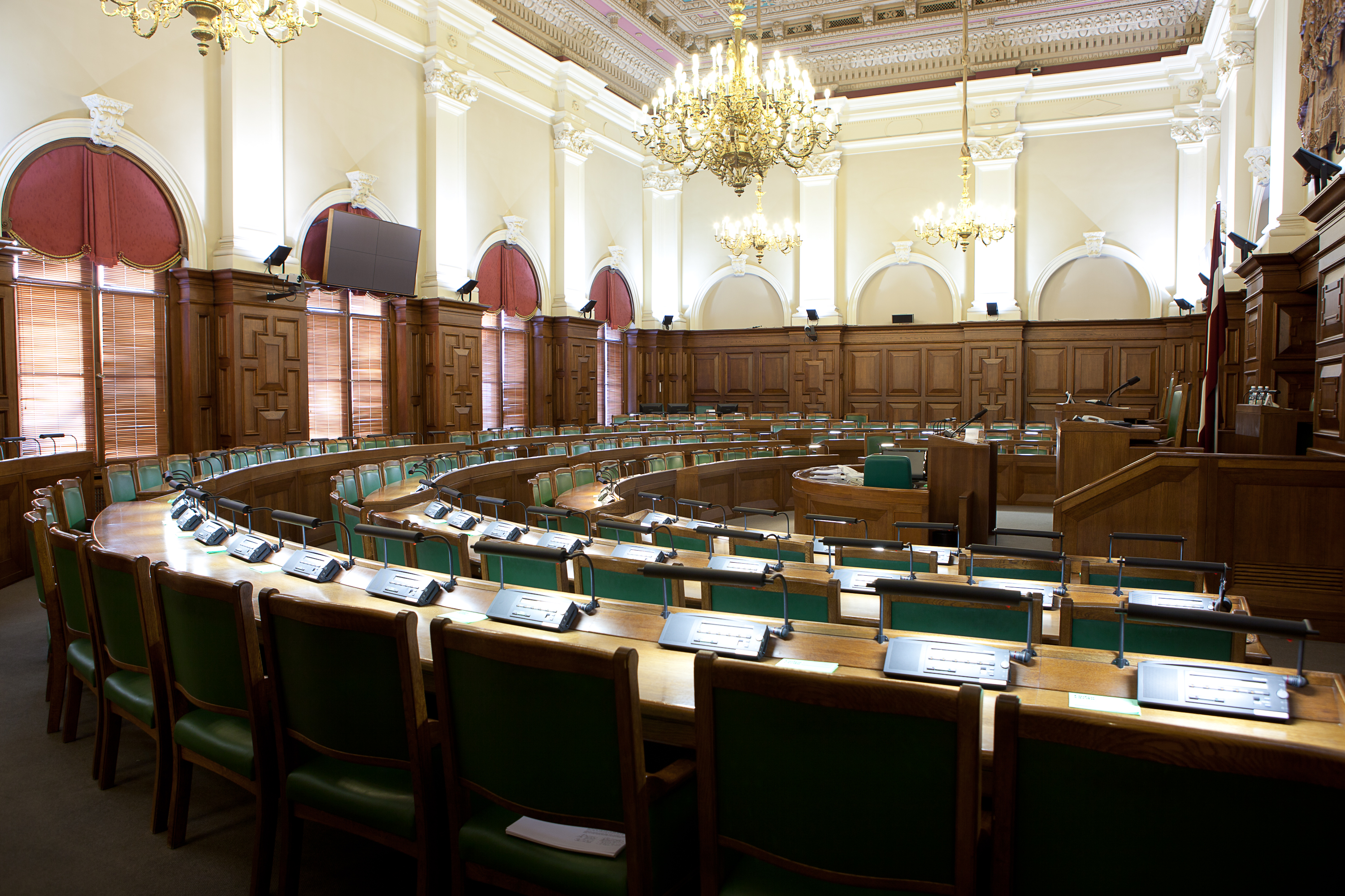 Foto: Saeima